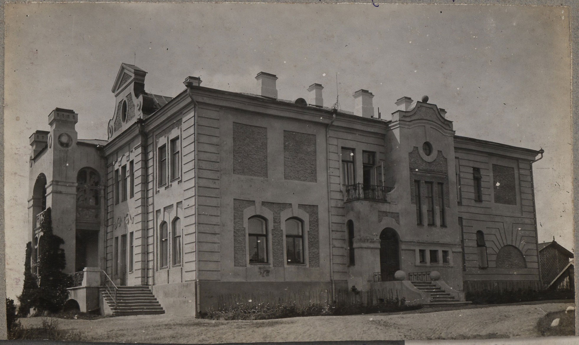 Беларуская (тарашкевіца): Крупкі (Krupki), сядзіба Сьвяцкіх (Śviacki)